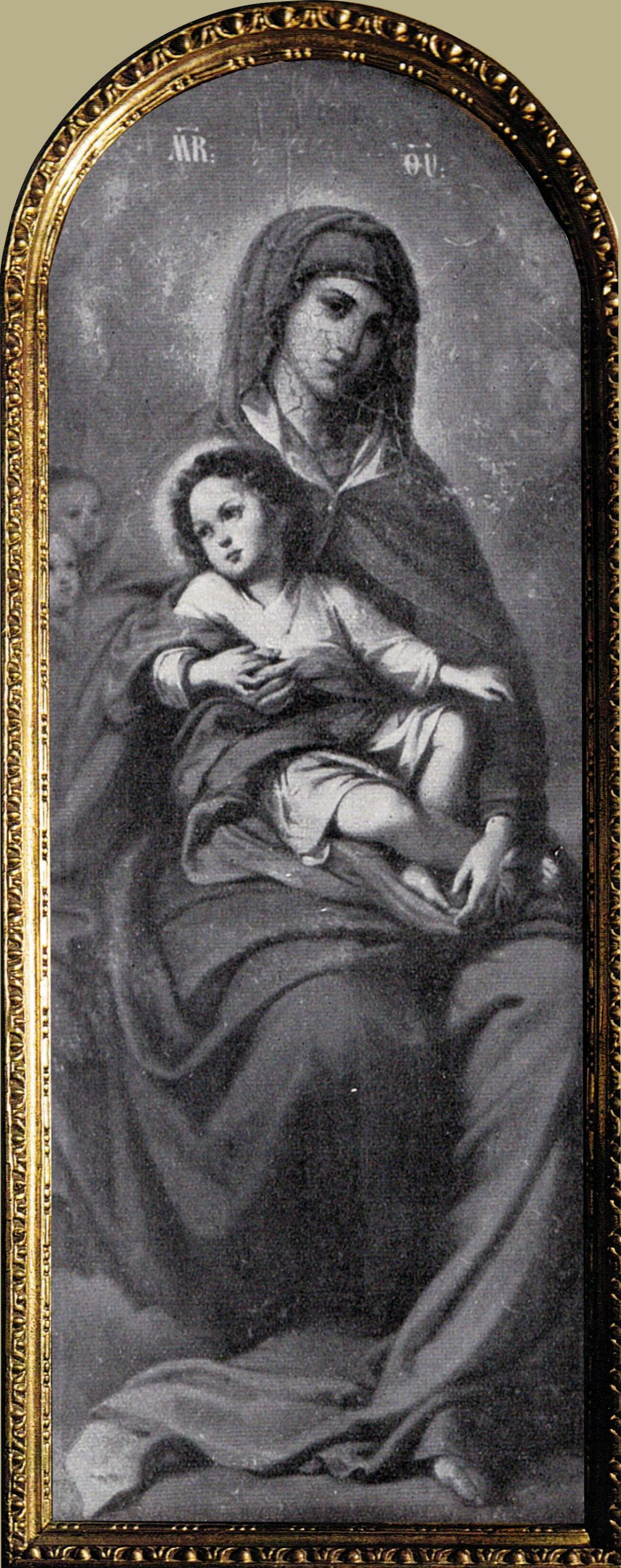 Maica Domnului